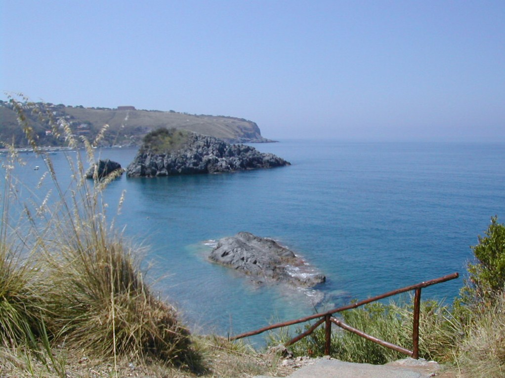 Spiaggia di San Nicola Arcella (CS) Summary ElenaGM